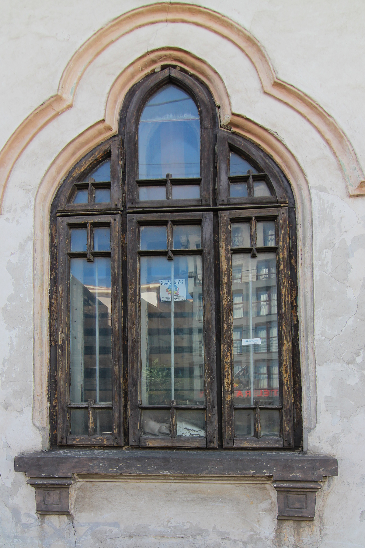 Imobil pe Calea Călărașilor